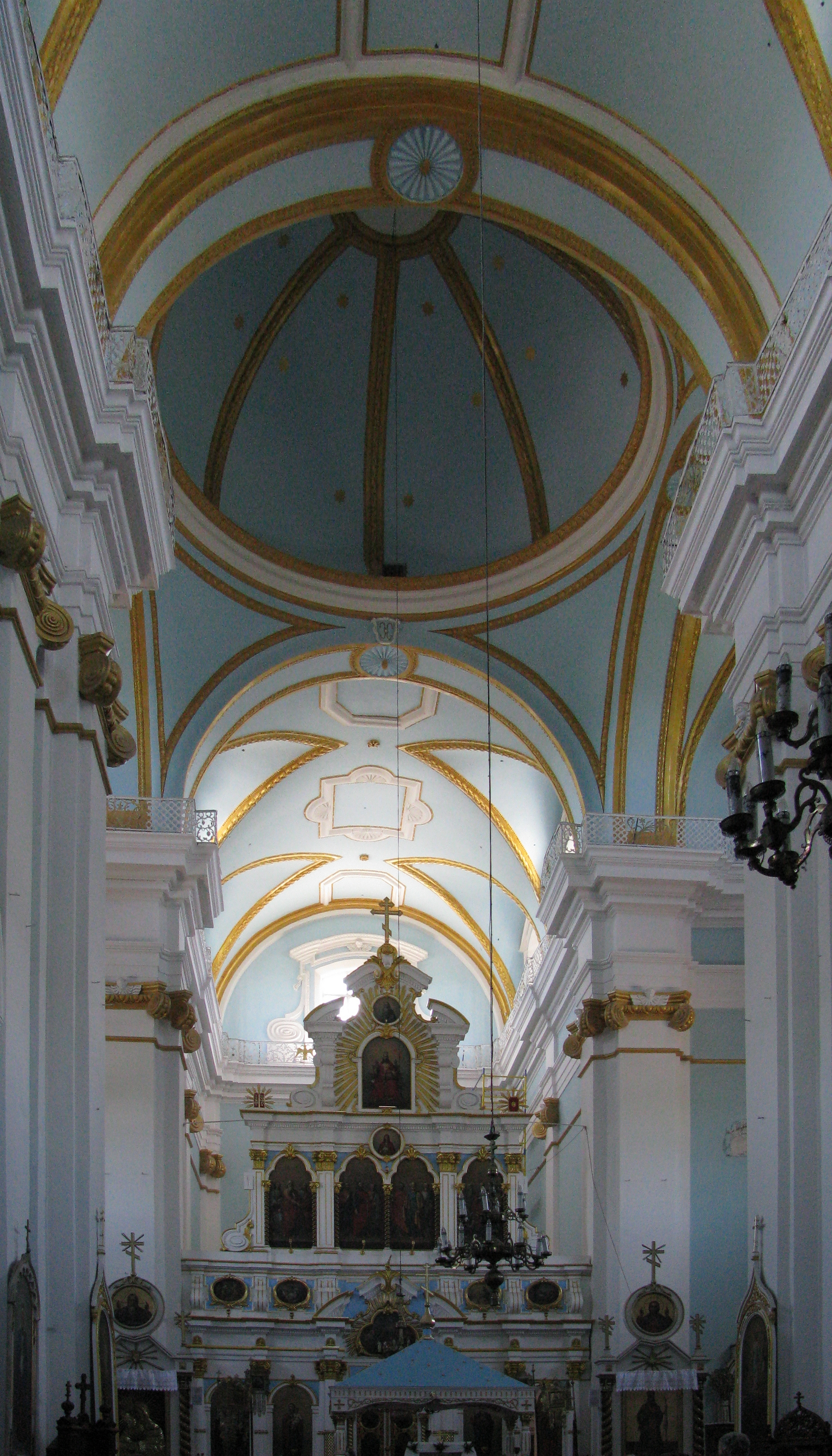 Беларуская (тарашкевіца): Комплекс былога кляштара кармэлітаў: царква Раства Багародзіцы, уваходныя дзьверы і дэкаратыўная галерэя па пэрымэтры царквы, будынак кляштара, агароджа з брамай. г. Глыбокае